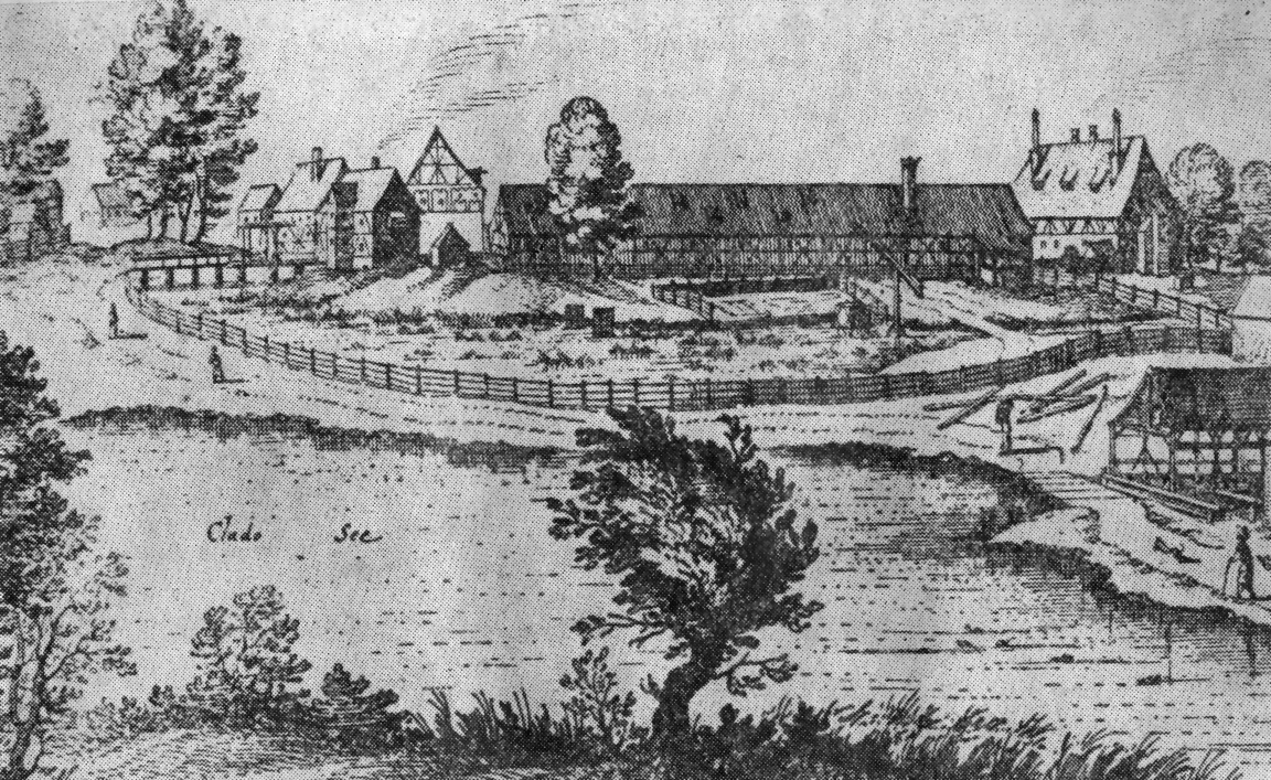 Folwark klasztorny w Mironicach (wówczas "Himmelstadt") w 1650 r., woj. lubuskie, Poland